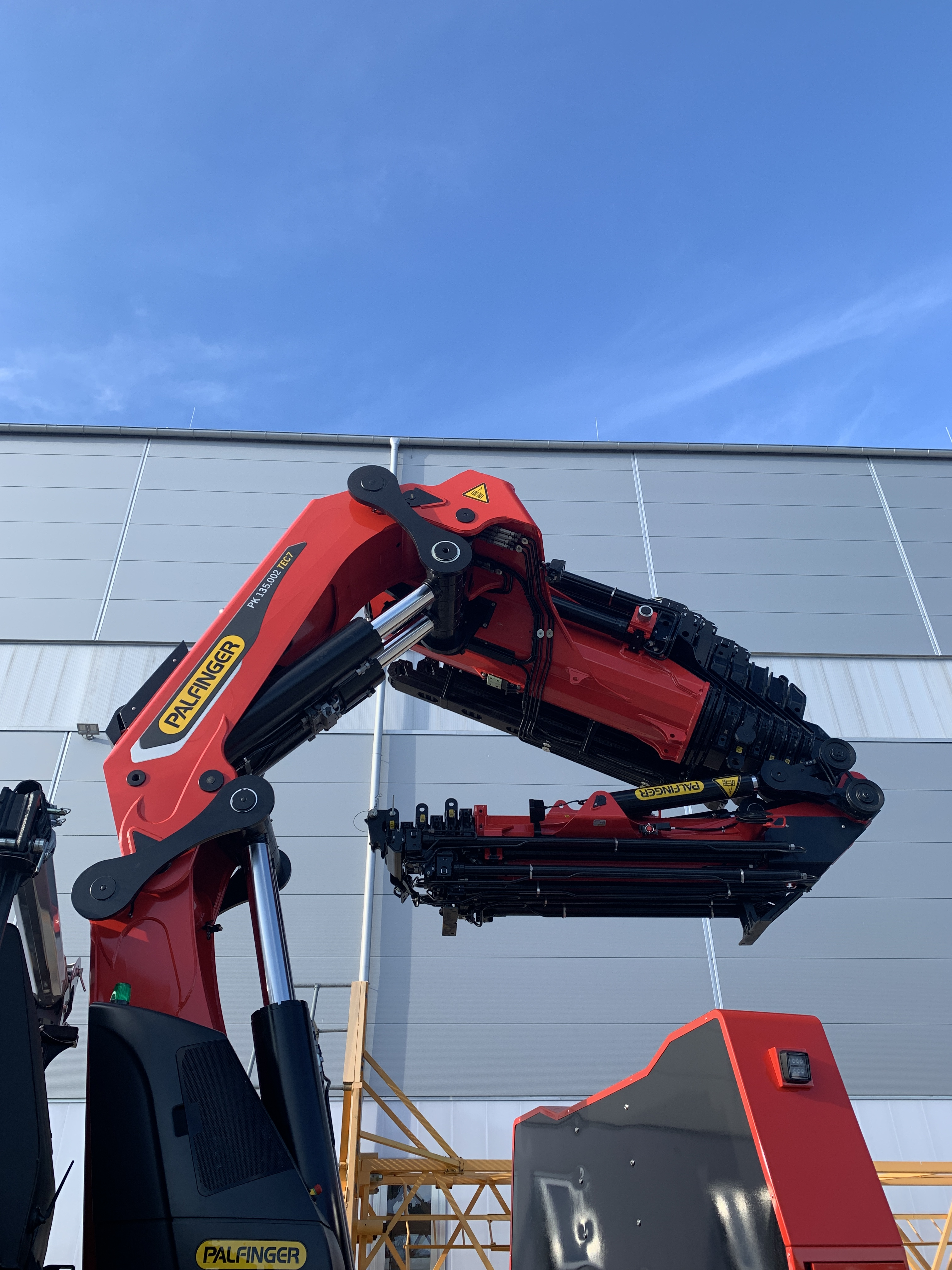 PK 135.002 TEC 7